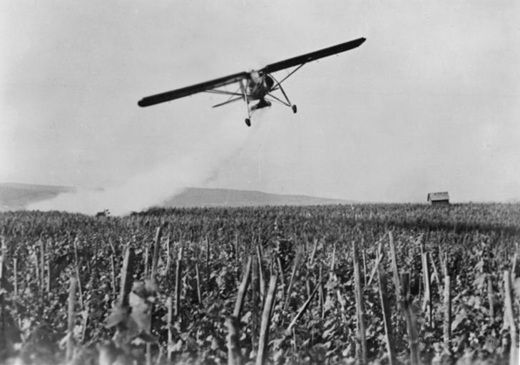 Bratislava, Insektenbekämpfung in Weingärten Aufn. Illus II 557.AV Hein-Mo Berlin W 8 3.7.1951 Insektenbekämpfung durch Flugzeuge in den tschechoslowakischen Weingärten. Zur Bekämpfung der von Insekten und Krankheiten befallenen Weinstöcke in den tschechoslowakischen Weingärten, ließ die Landwirtschaftliche Genossenschaft in Bratislawa die Weingärten durch Flugzeuge mit besonderen chemischen Mitteln, "Verzol" und "Dynovad" genannt, besprengen. Die Sprengmethode der nach sowjetischem Vorbild ausgerüsteten Flugzeuge, ersetzt die Tagesarbeit von 80 Menschen. UBz: Langsam fliegt das Flugzeug über die Weingärten und besprengt die von Insekten befallenen Weinstöcke mit dem chemischen Mittel.